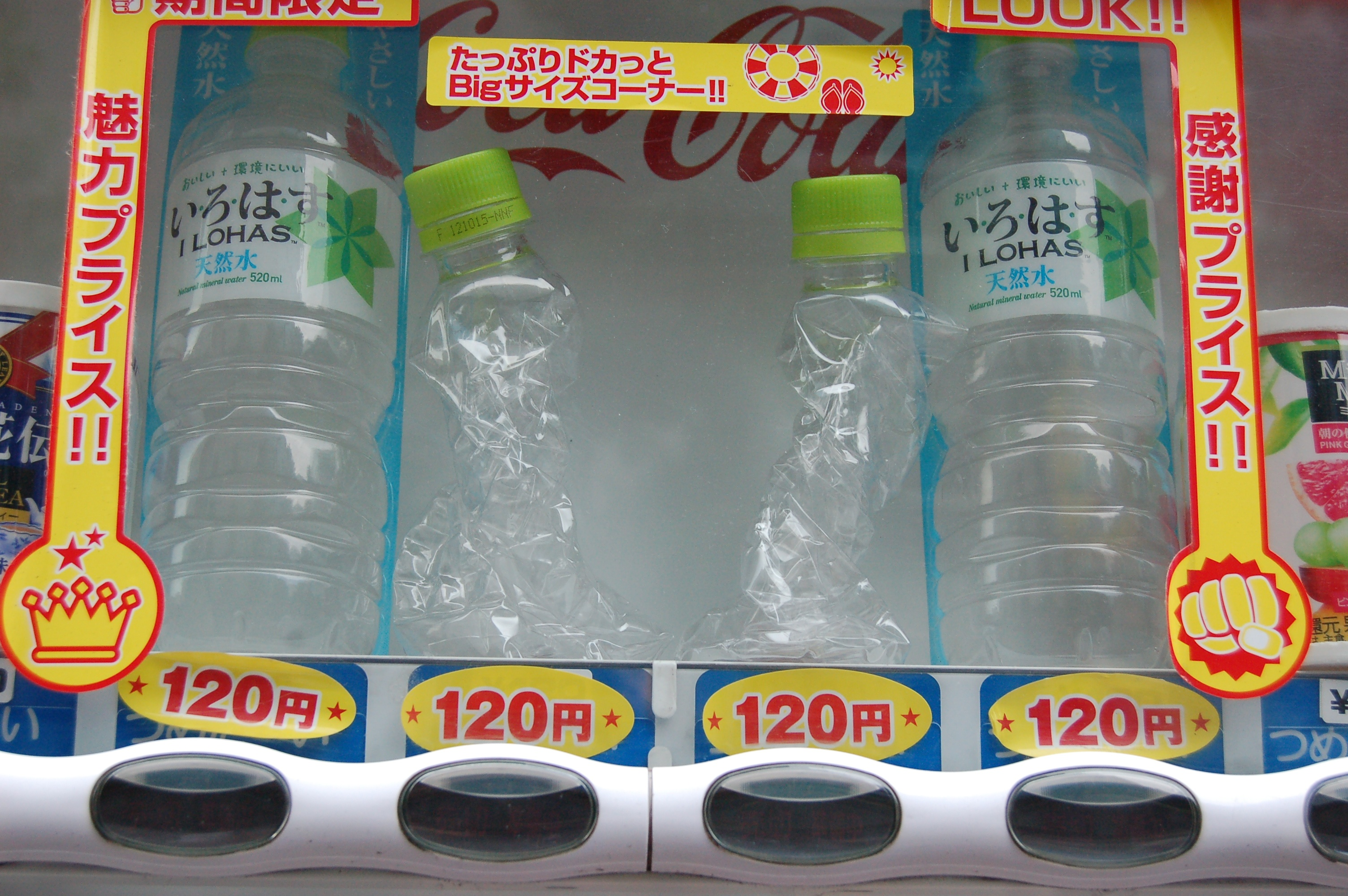 120 yens pour une bouteille écrasée, quand on vous dit que Tokyo est une ville chère…